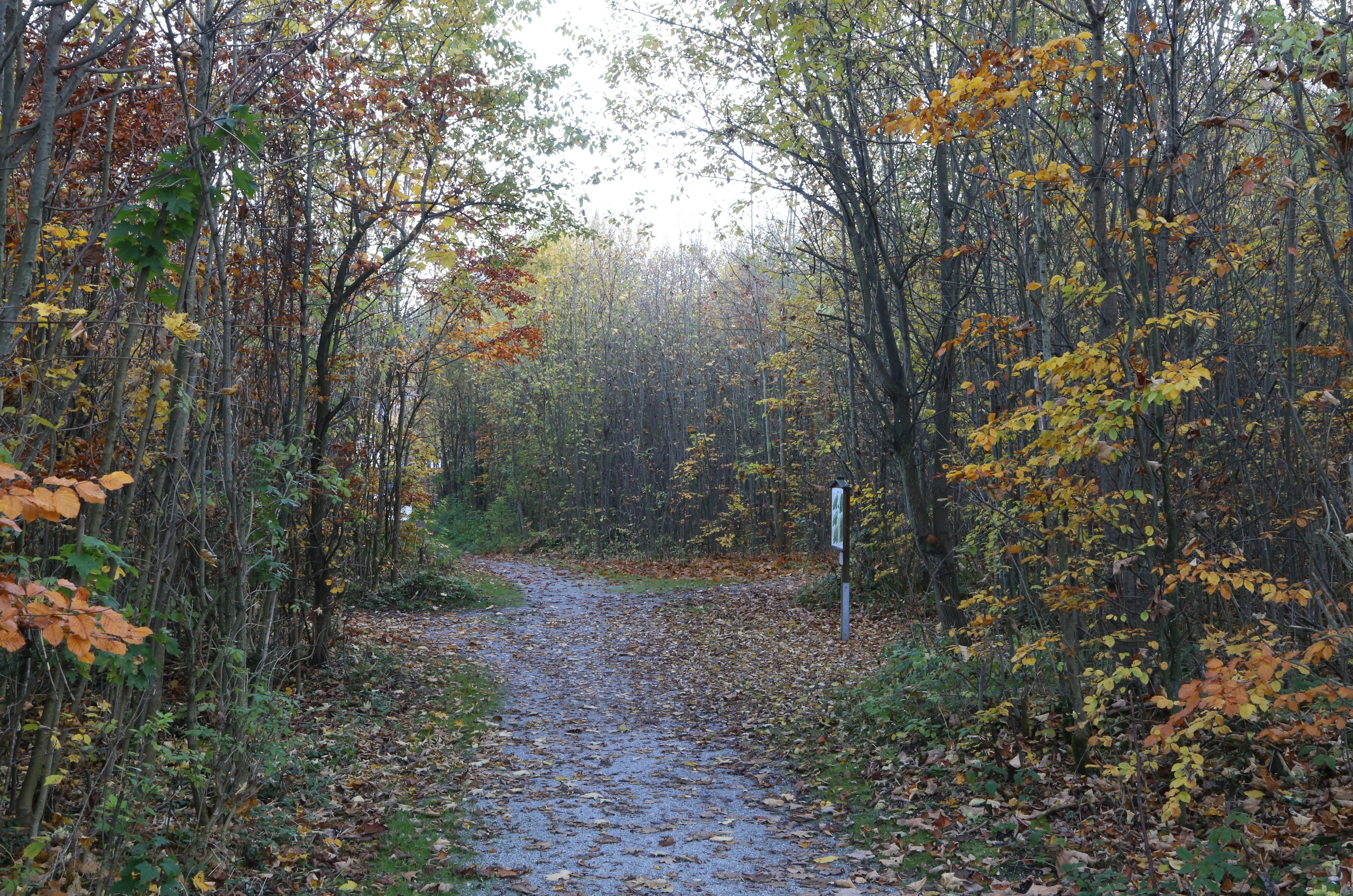 LSG Brandl (Inschutznahme des sog. Brandl), Brannenburg